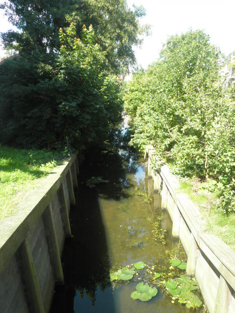 Het einde van de voormalige rivier de Ee. Hier verlaat het water de stad Edam.